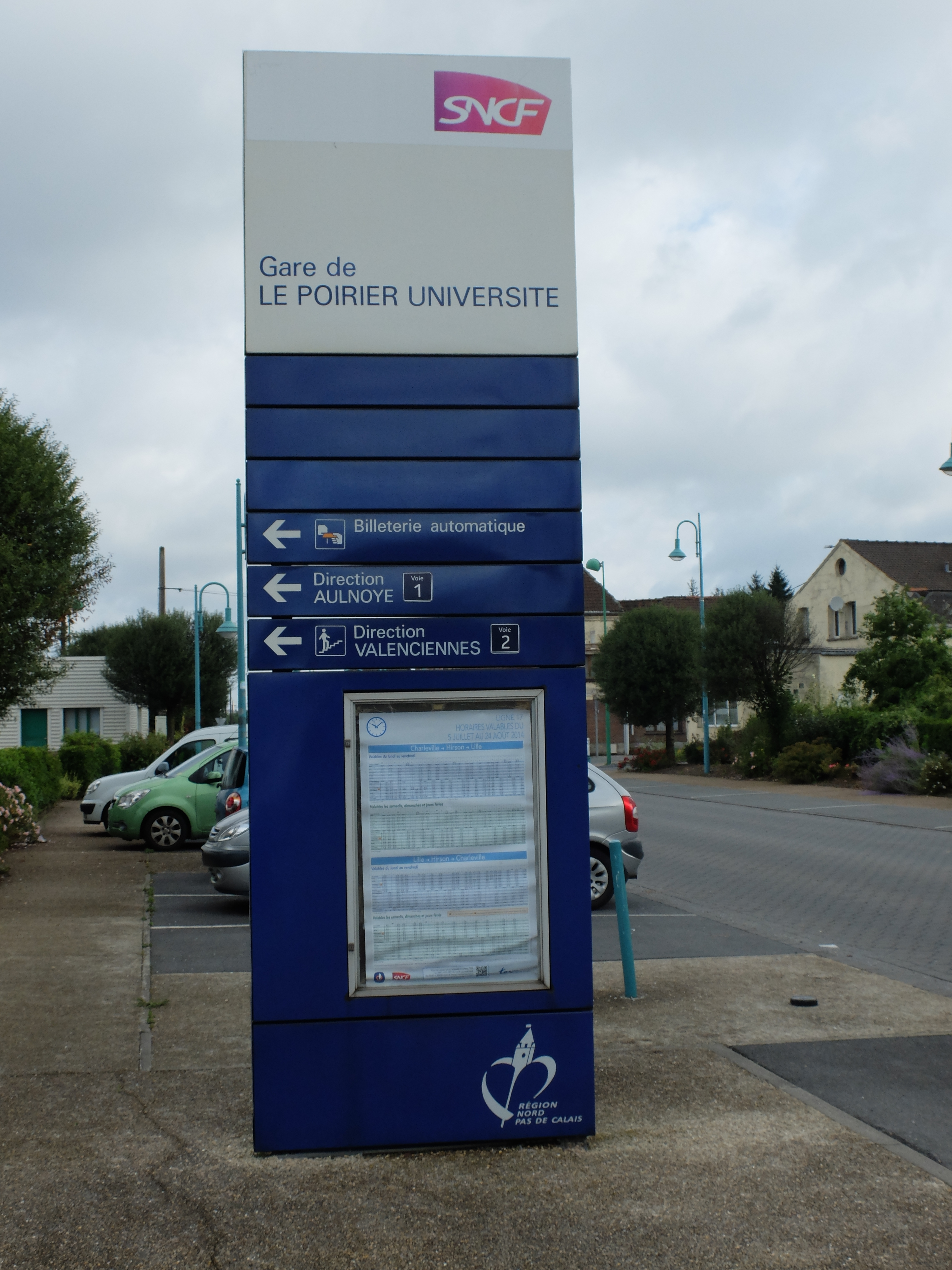 Vue d'un panneau indiquant l'entrée de la gare du Poirier-Université.